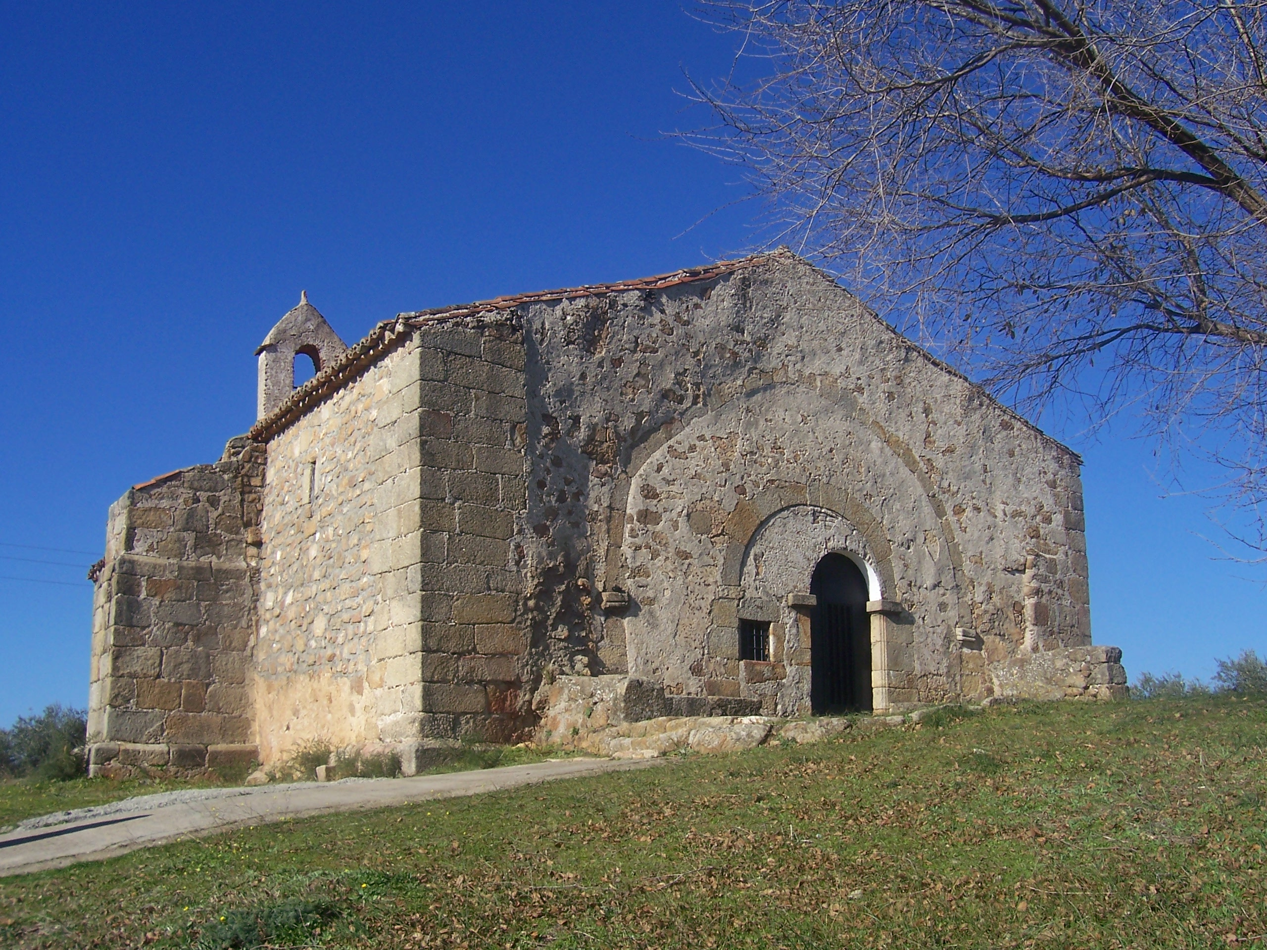 Ermita de San José, en el monte de San José, Pozuelo de Zarzón, Cáceres, España